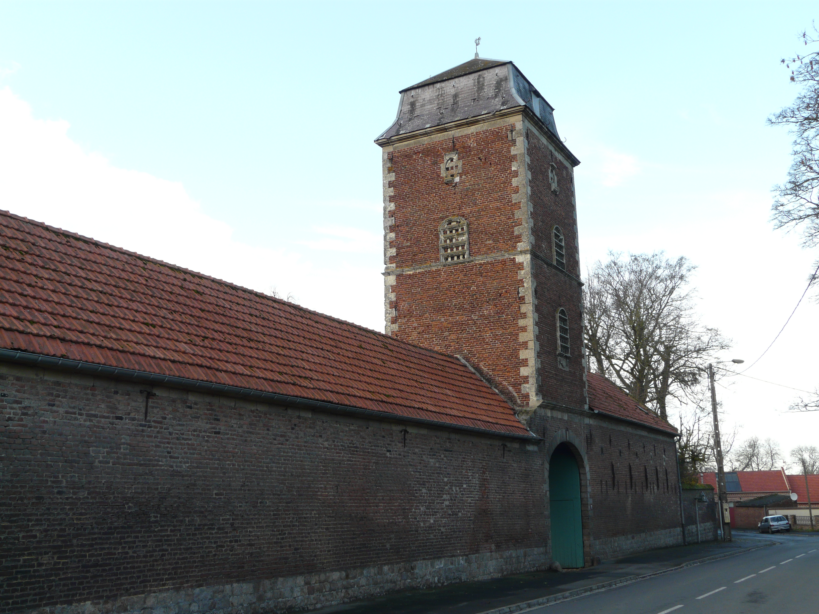 Le porche-pigeonnier de la ferme de Valicourt à Blécourt (Nord)